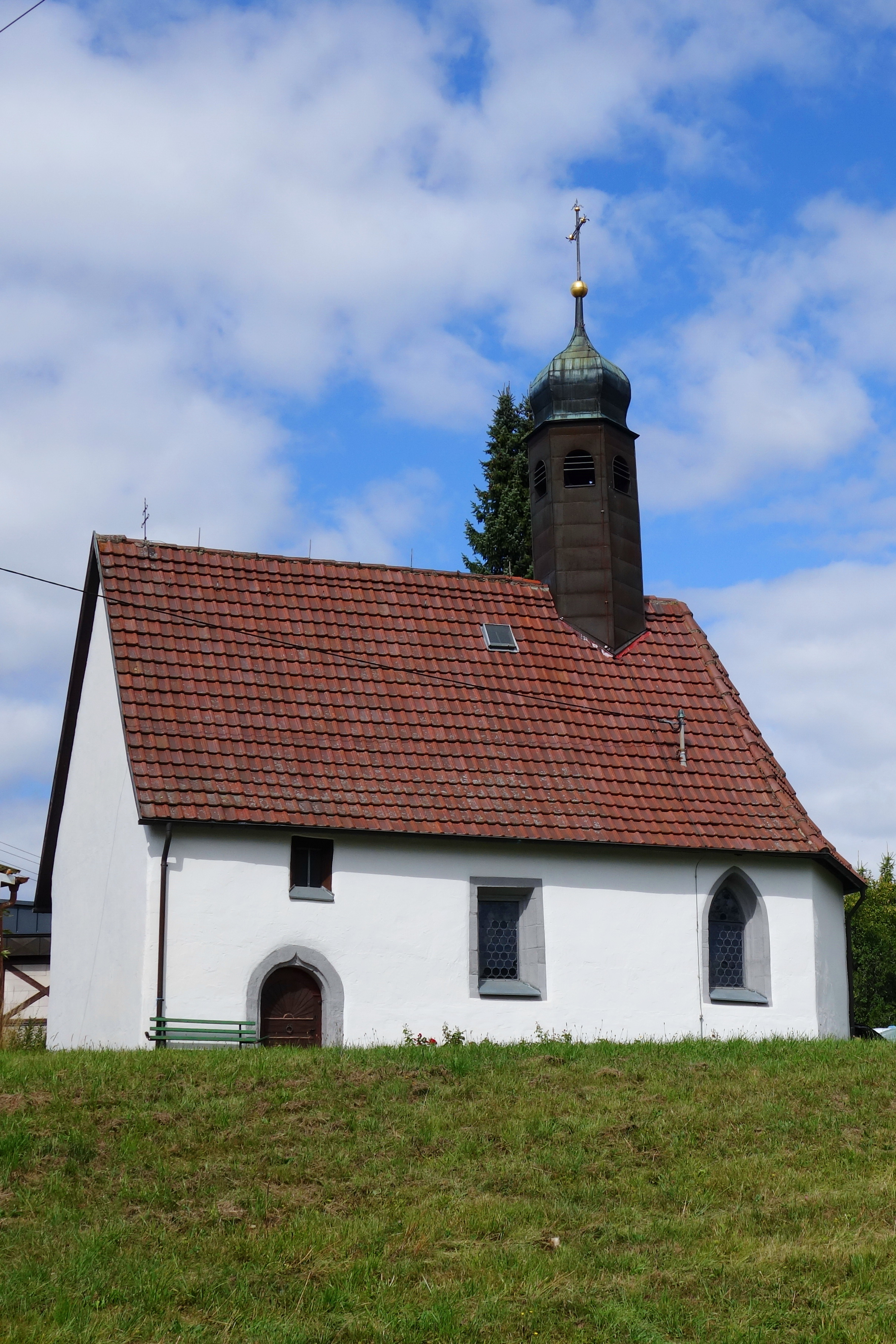 Nikolauskapelle in Denkingen, Hauptstraße 140